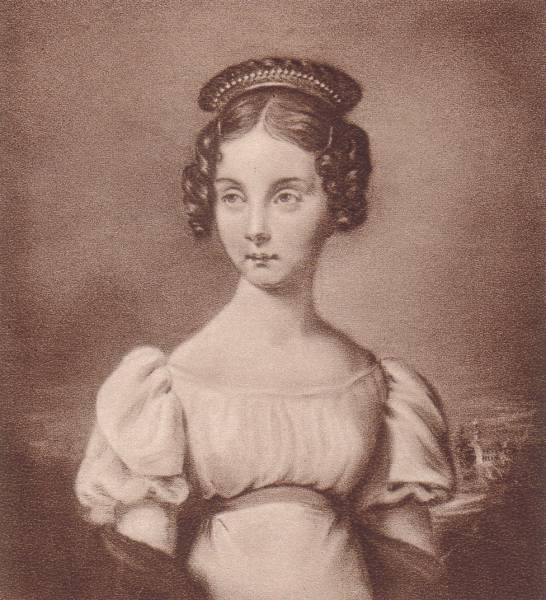 Charlotte von Preußen, spätere Zarin von Russland, als Kind